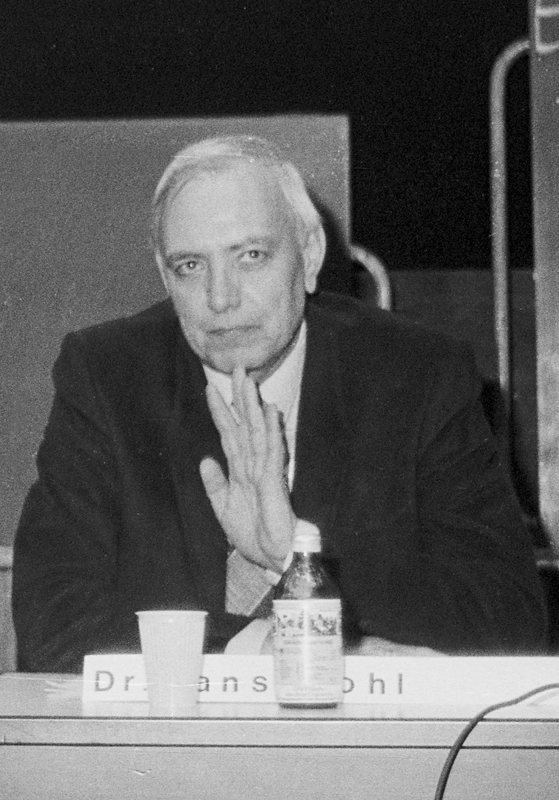 Hans Mohl (* 1928, † 1998) deutscher Fernsehjournalist und Moderator Aufnahme vom 7.11.1986, während einer Veranstaltung der AIDS-Tagung in Berlin